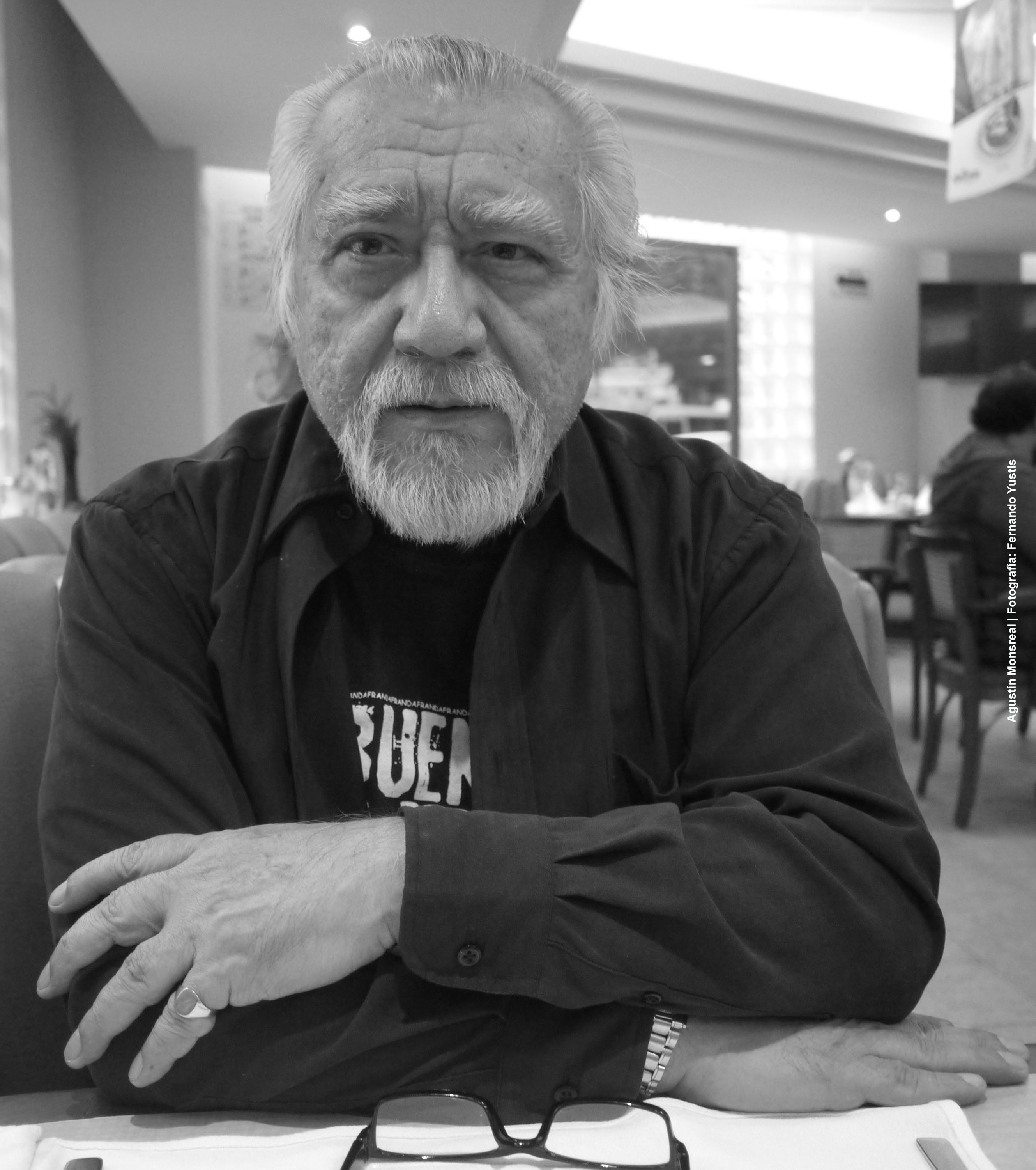 Aparece Agustín Monsreal sentado y cruzado de brazos.